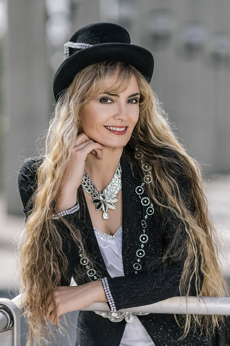 Kolekce foto kouzelnice Radana, fotograf Libor Pawlas